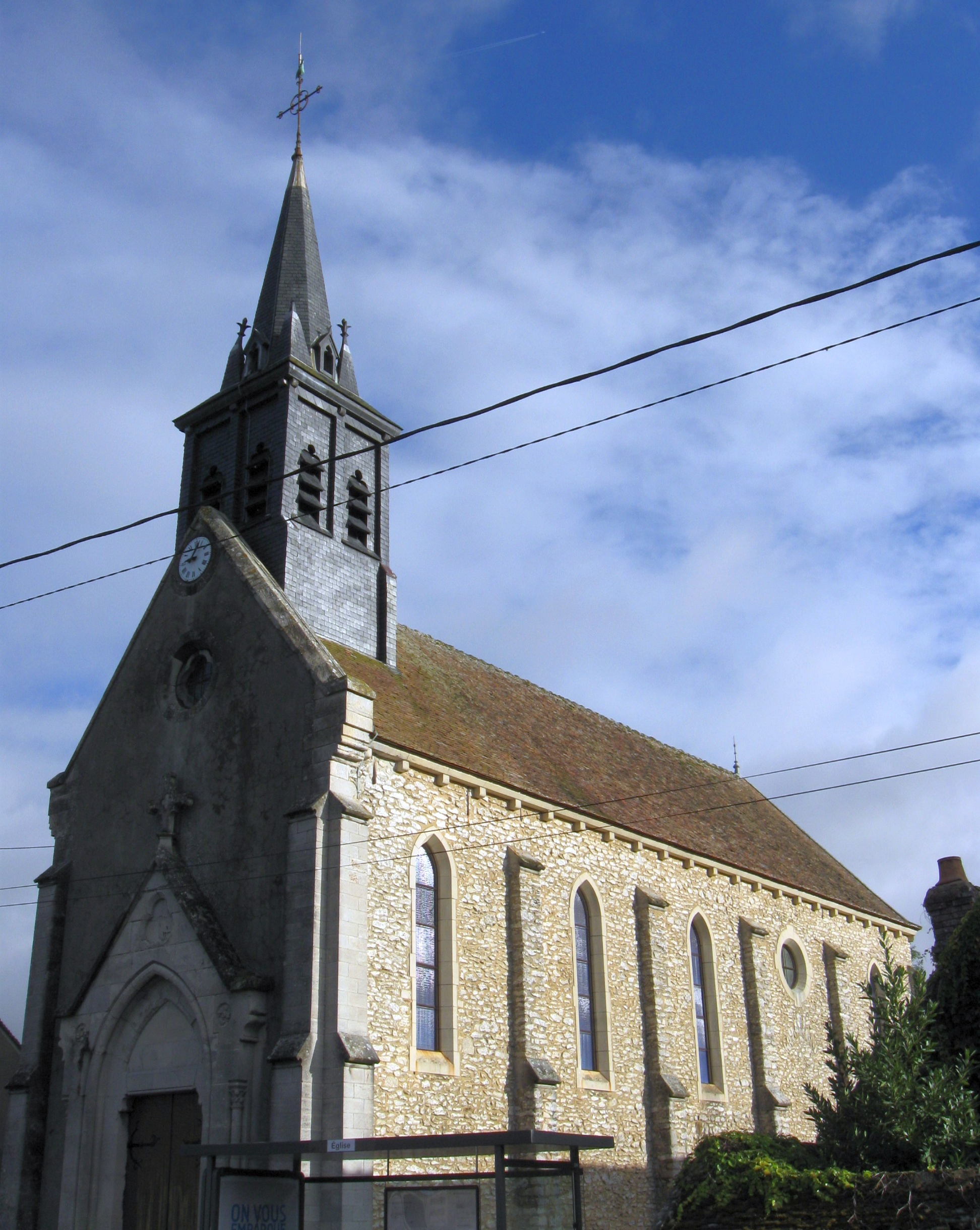 Église Saint-Jacques-le-Majeur de Gurcy-le-Châtel. (Seine-et-Marne, région Île-de-France).